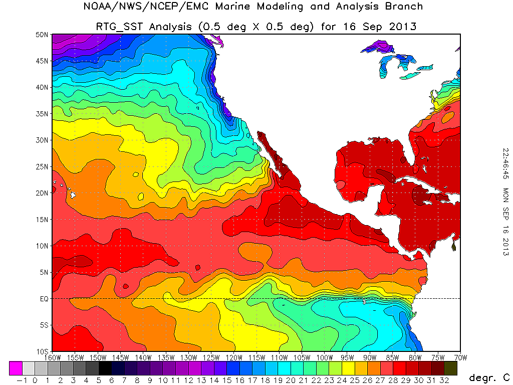 Temperatura superficial del Océano Pacífico central y oriental. Fecha: 16 de sept. de 2013